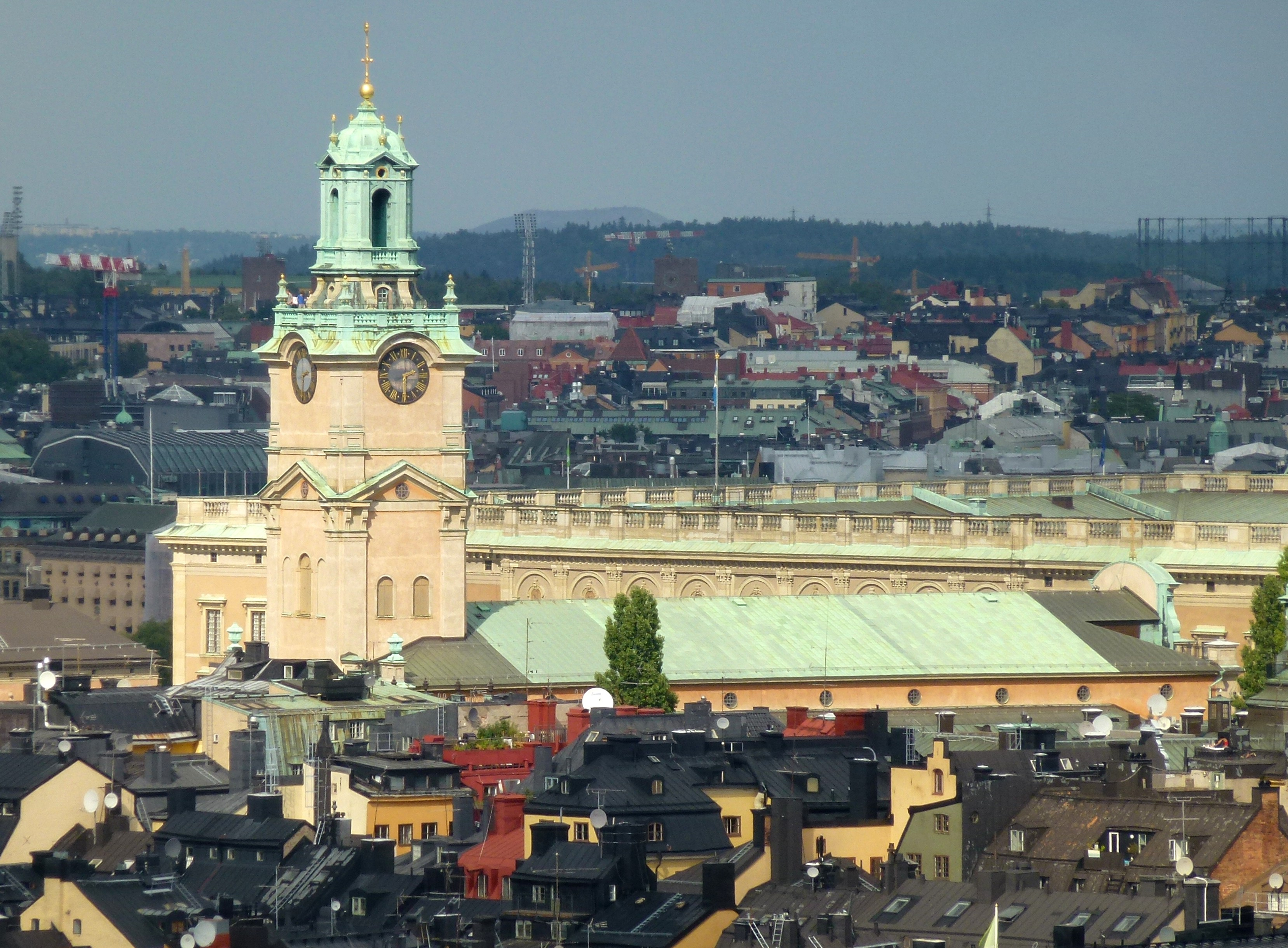 Storkyrkan sedd från Maria Magdalena kyrka